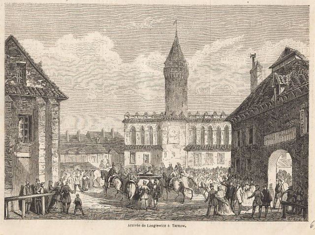 Wjazd M. Langiewicza do Tarnowa z powstańcami w marcu 1863 r. Rycina M. Victora z 1863 r